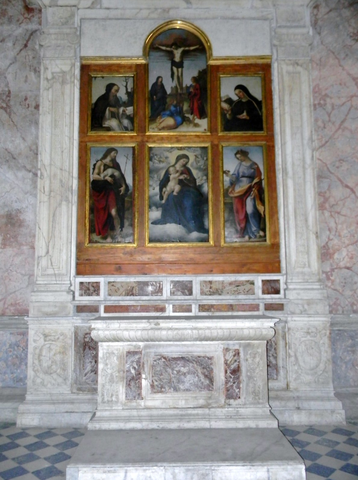 Andrea da Salerno, Madonna col Bambino, Crocifissione e diversi santi, 1529, Napoli, Chiesa dei S.S. Severino e Sossio.